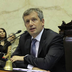 El presidente de la Cámara de Diputados de la Nación Argentina, Emilio Monzó.